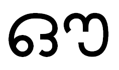 Аукарам малаялам